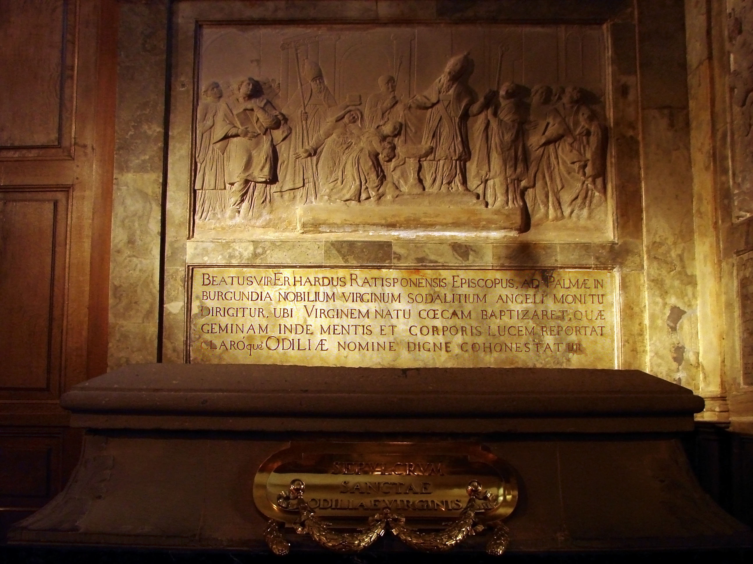 Le monastère du Mont Sainte-Odile: chapelle du tombeau, Bas-relief "Vie de Ste Odile" (1696)